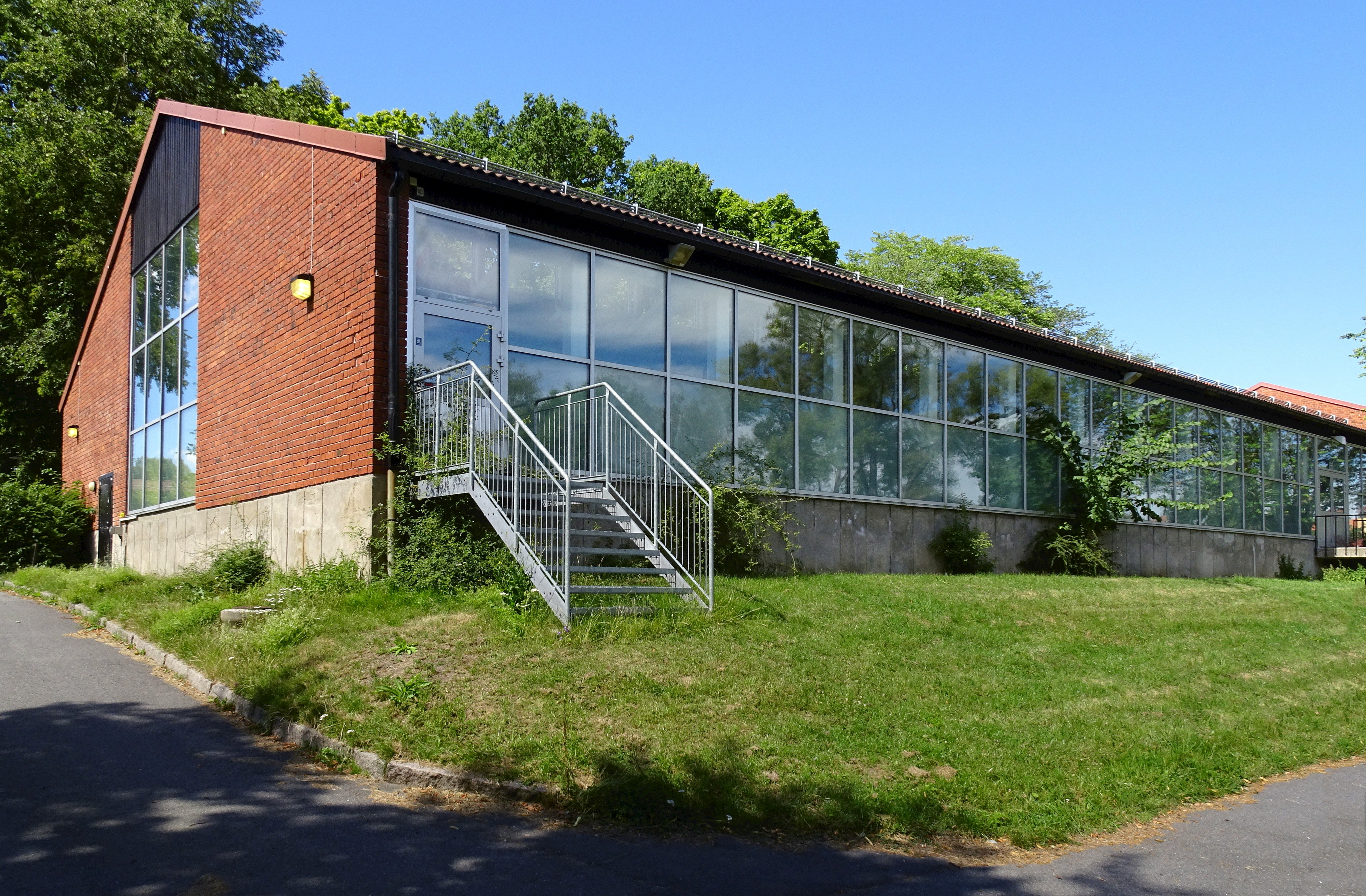 Gubbängsbadet